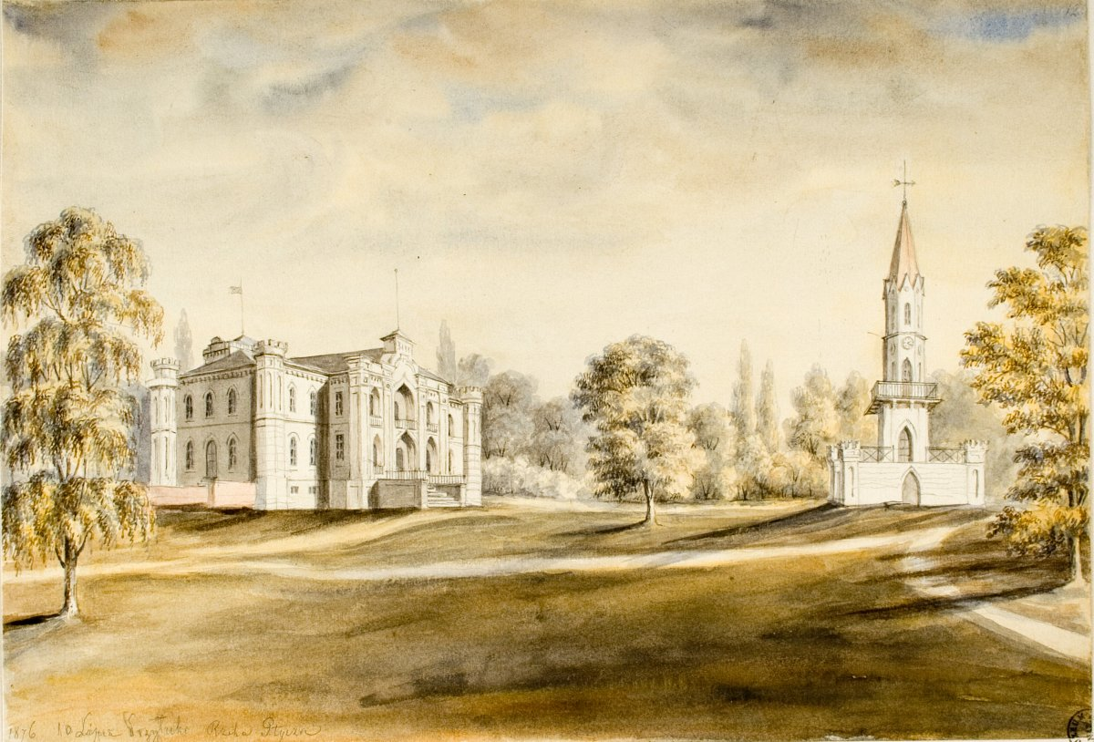 Беларуская (тарашкевіца): Прылукі (Pryłuki), сядзіба Чапскіх (Čapski)